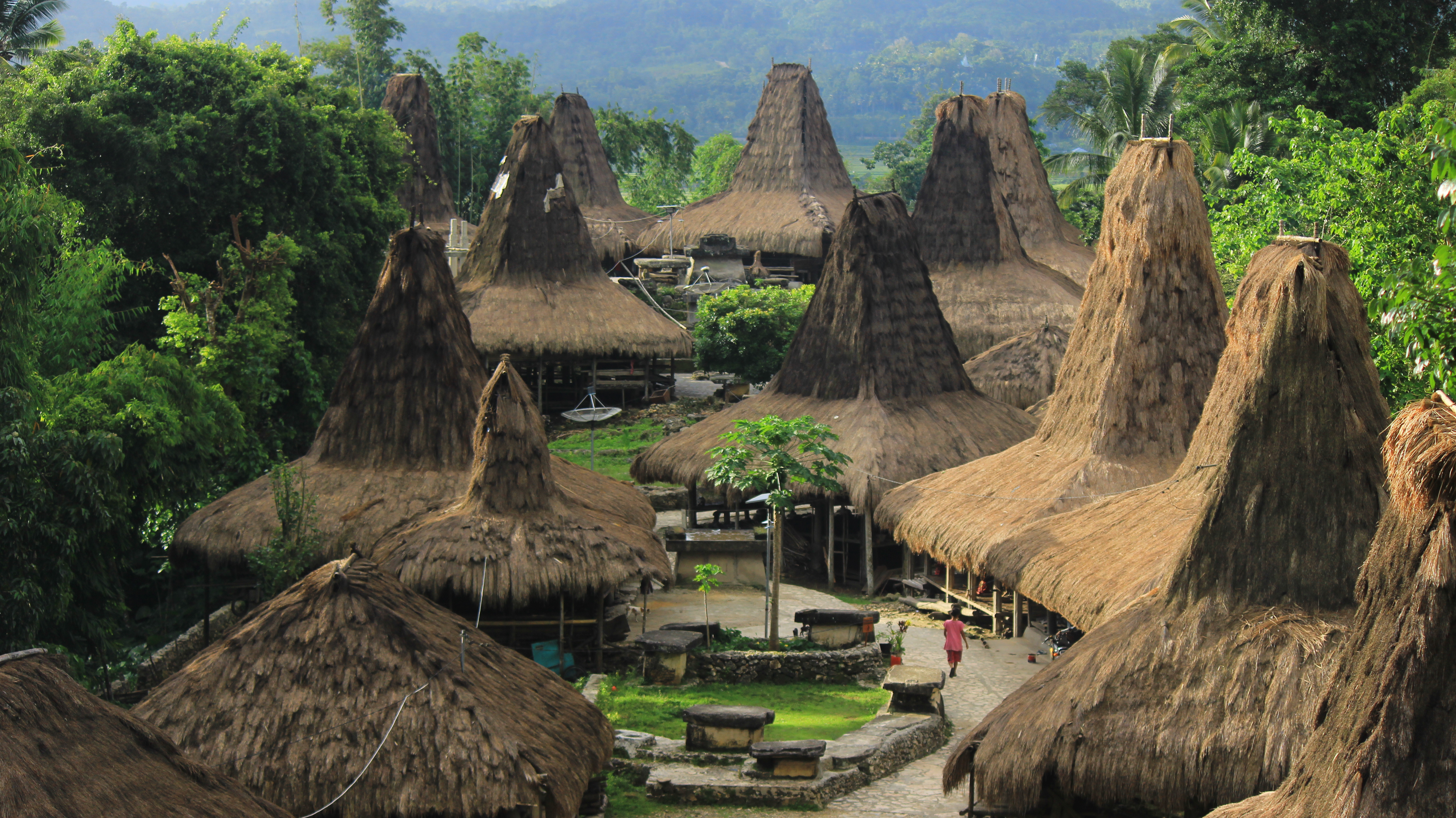 Kampung Adat Praijing merupakan kampung adat yang memiliki bangunan khas Sumba yang terletak di Waikabubak, Sumba Barat, Nusa Tenggara Timur, Indonesia.